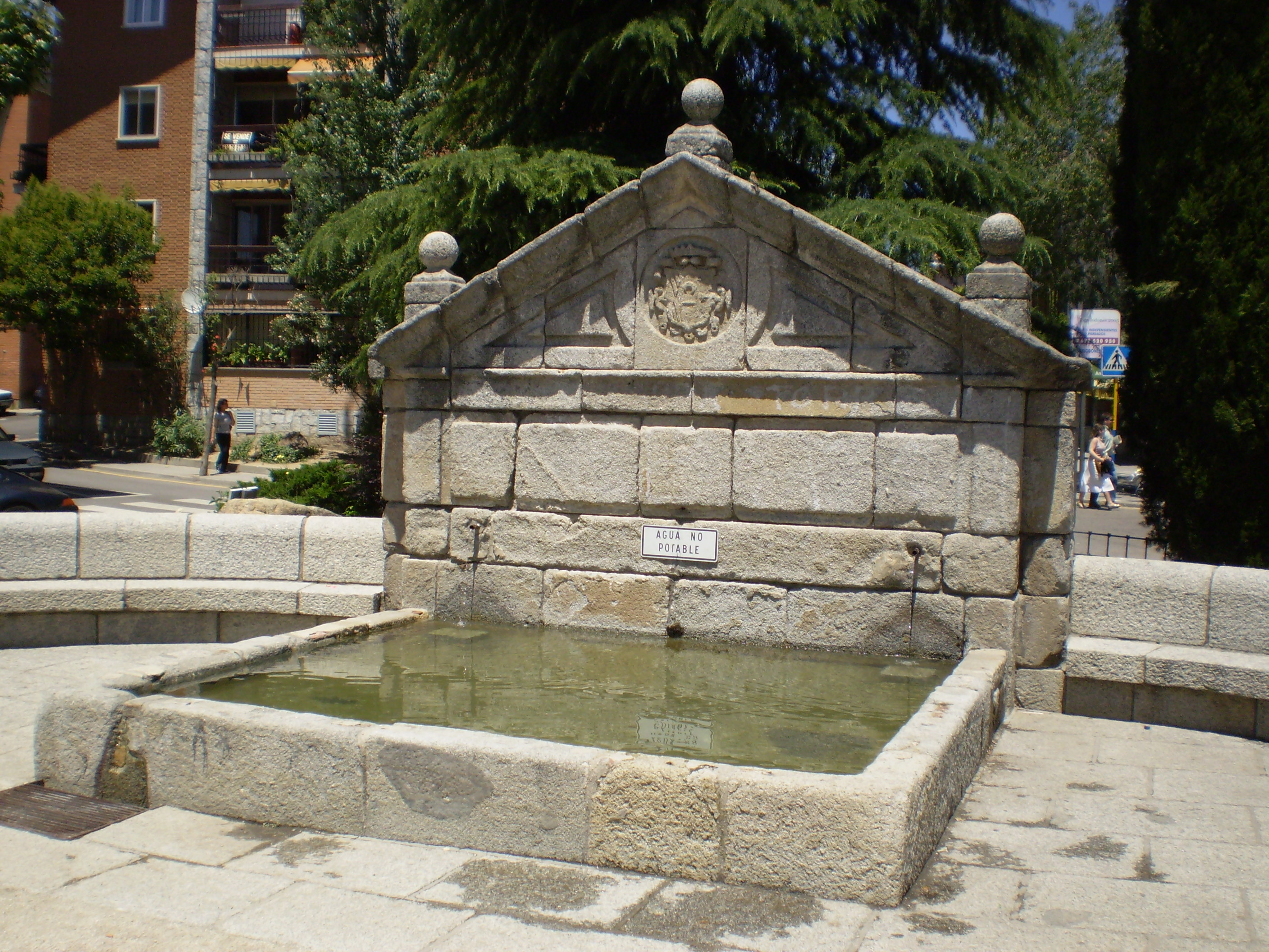 Fuente de El Caño. Torrelodones, Madrid, Spain